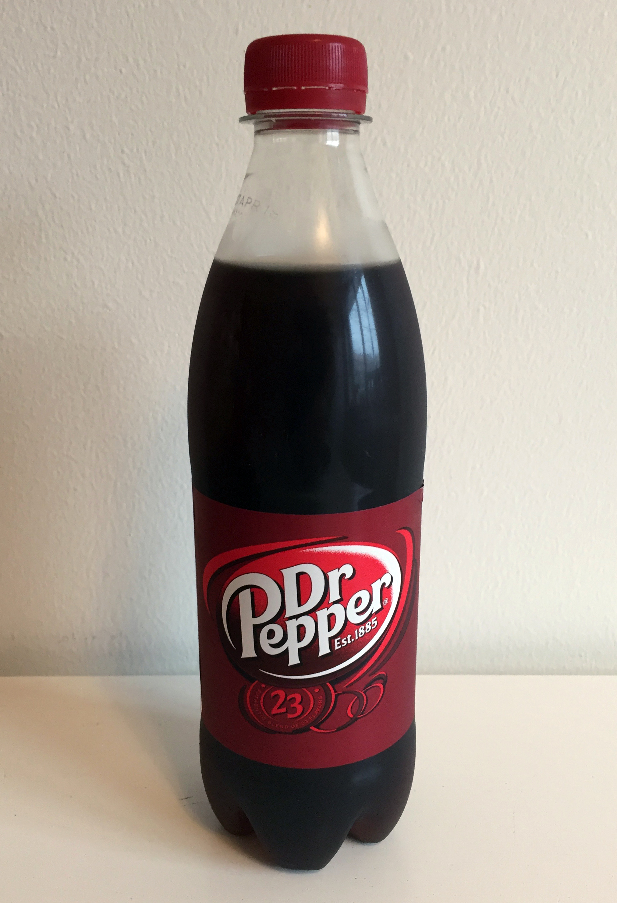 50 cl Dr Pepper, september 2017